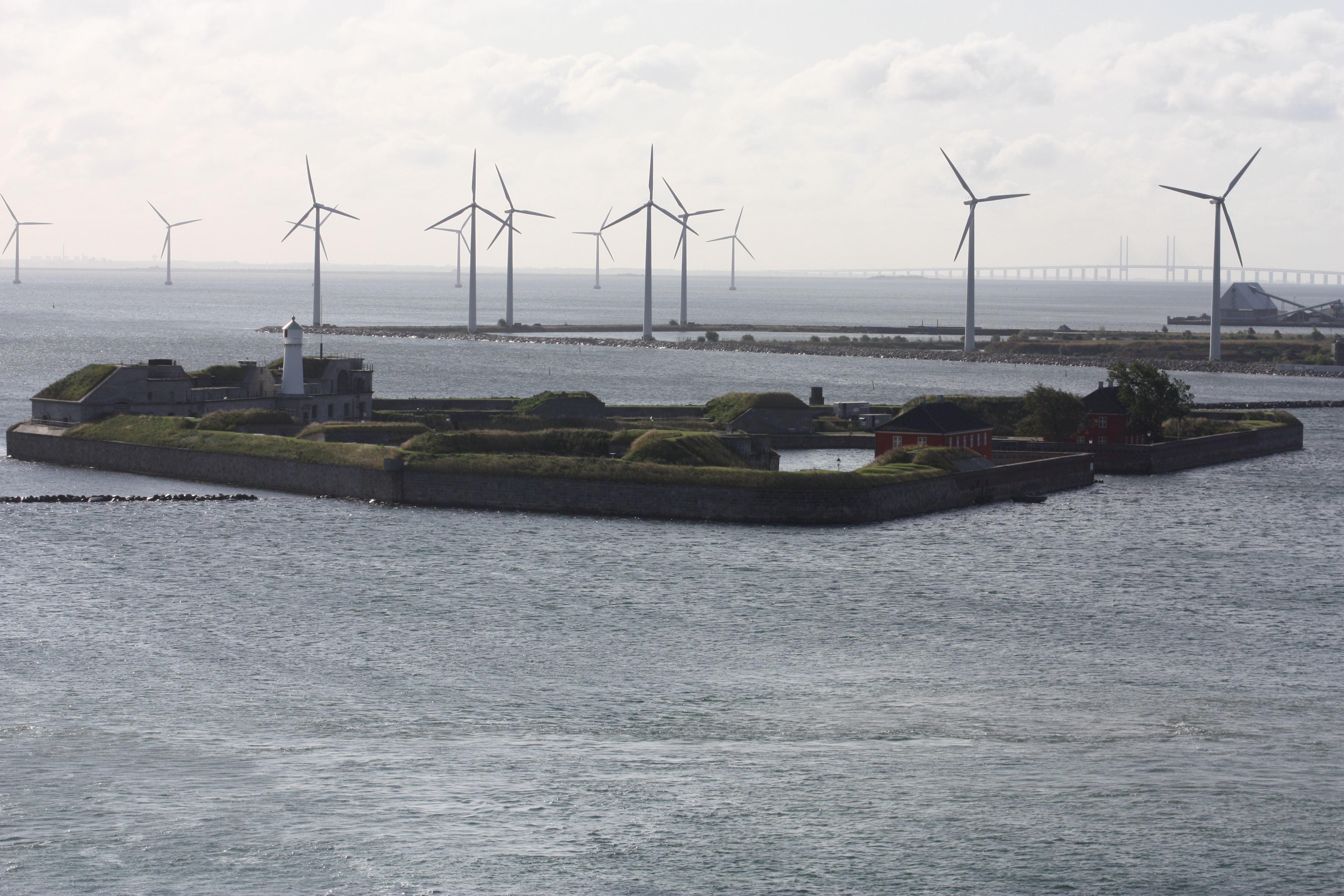 August 2009